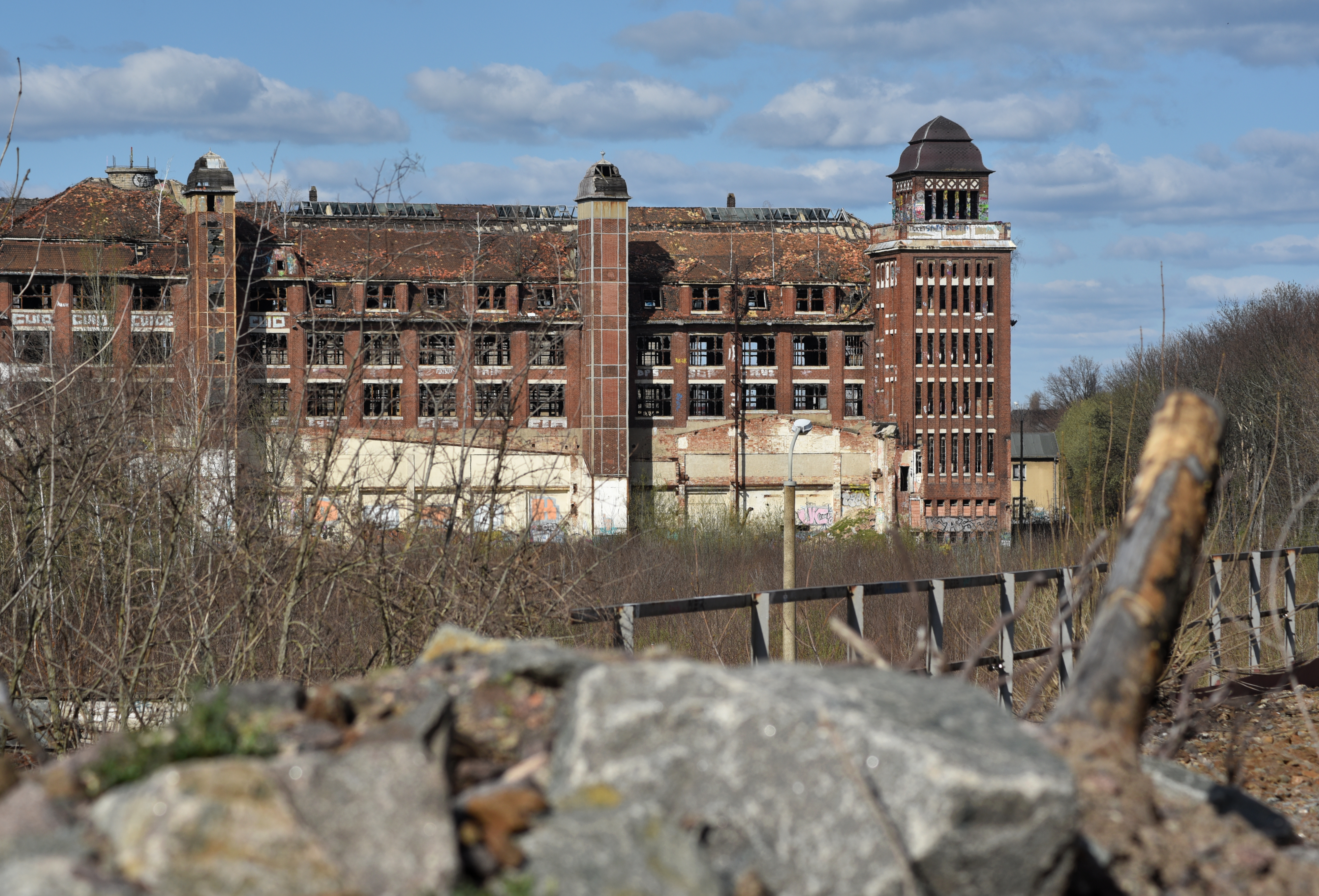 Ehemalige Karl Krause Fabrik in Leipzig Anger-Crottendorf – Blick vom ehemaligen Haltepunkt Leipzig Anger-Crottendorf (bis 2013)